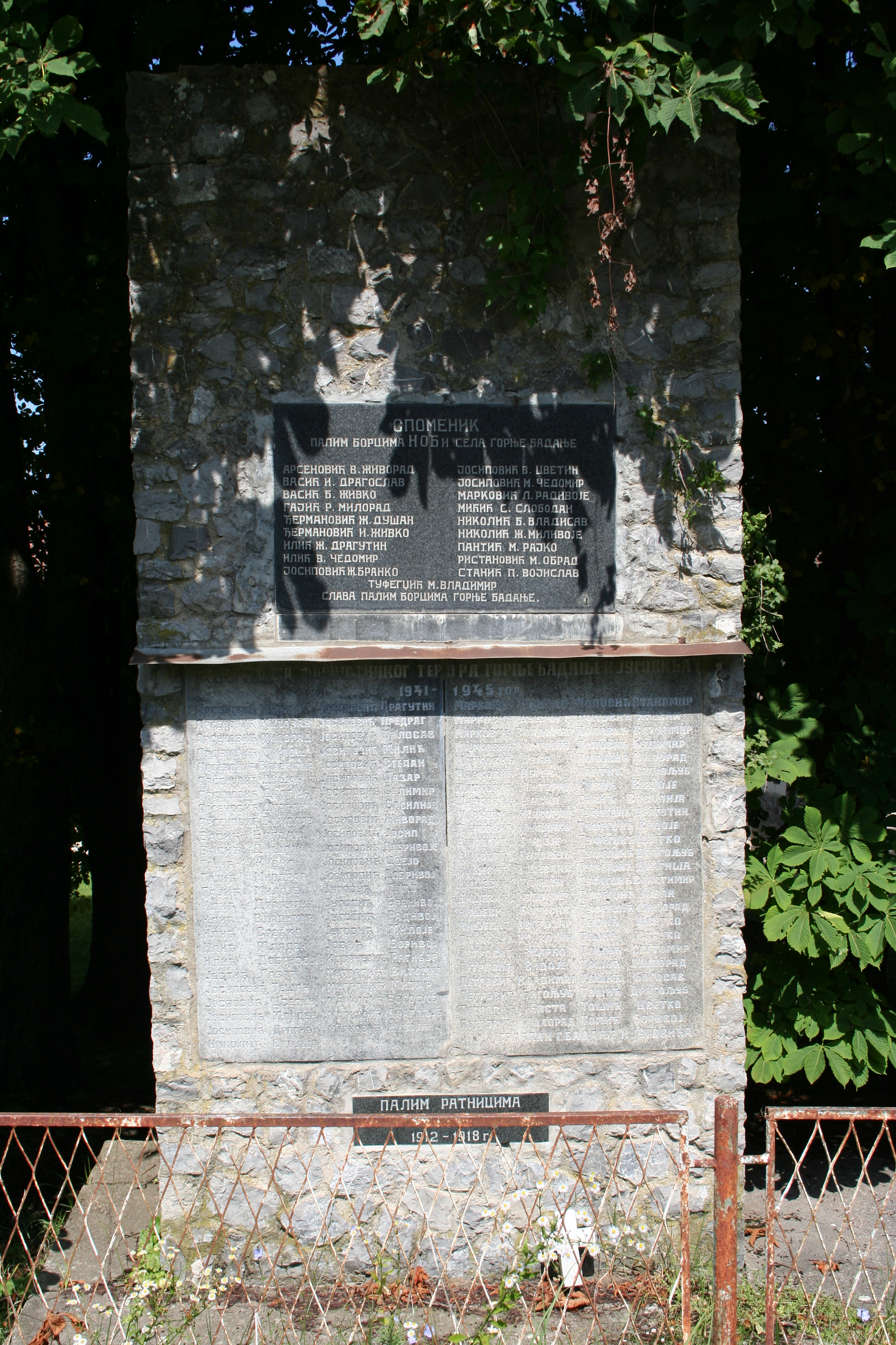 Spomenik u školskom dvorištu, Gornja Badanja